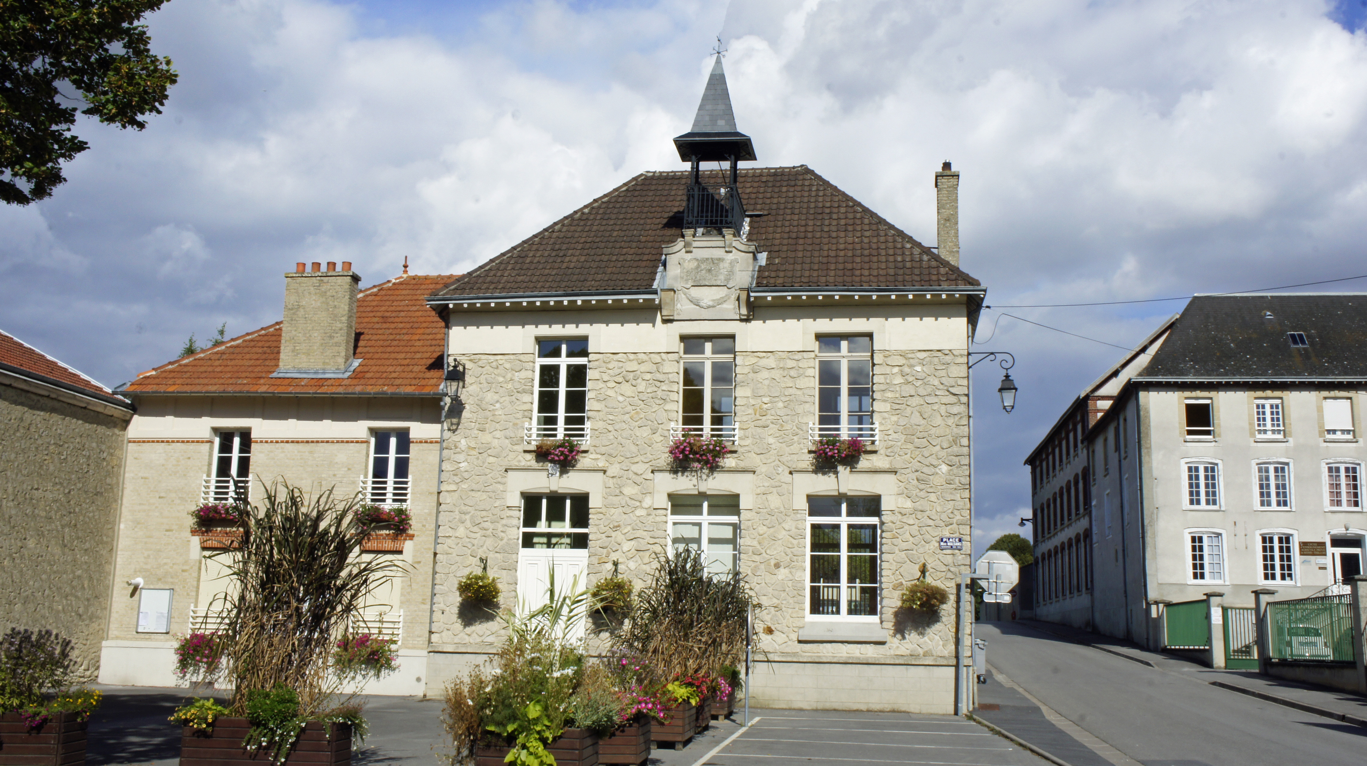 Vue de la Mairie de Thillois.